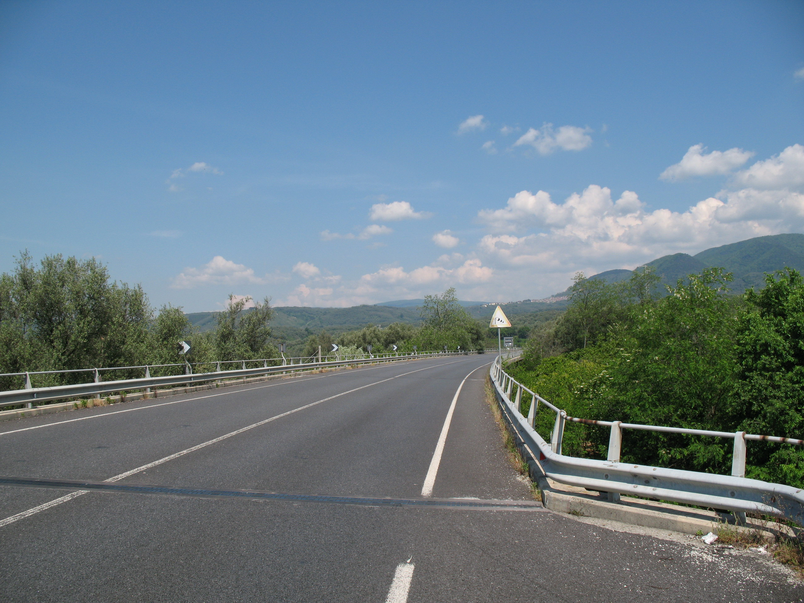 Strada Statale 682 Jonio-Tirreno, tra lo svincolo di Cinquefrondi-Polistena e quello Cinquefrondi